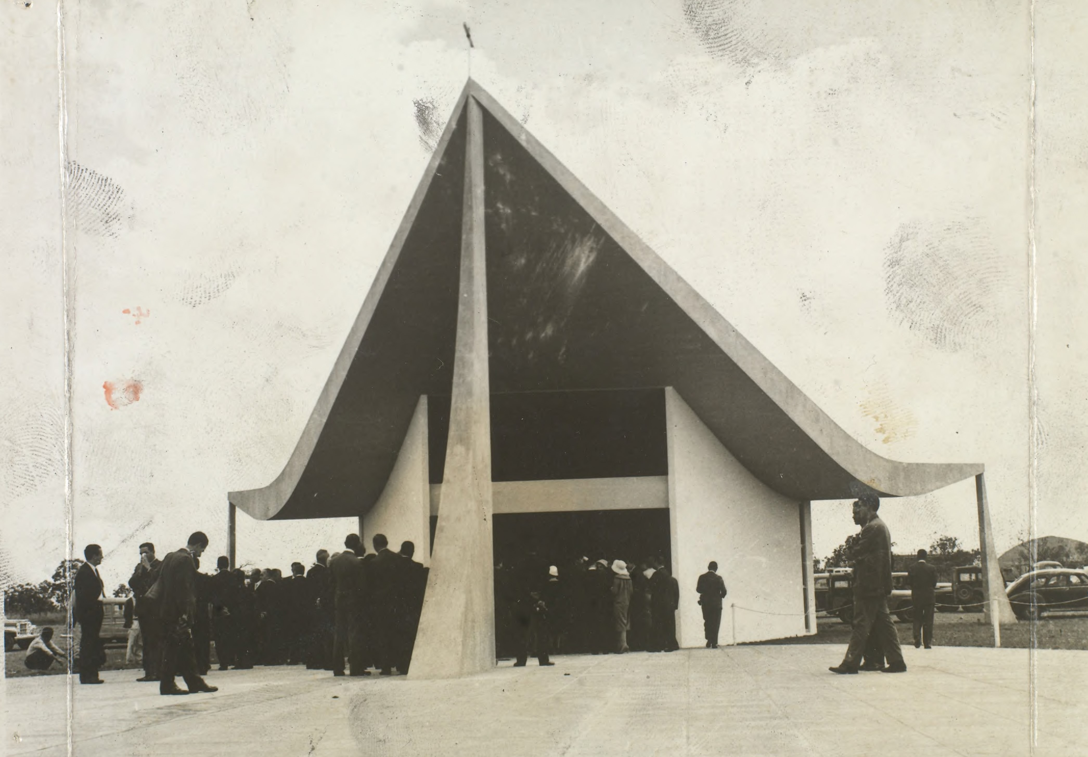 Fotografia do Fundo Correio da Manhã, sob a guarda do Arquivo Nacional.